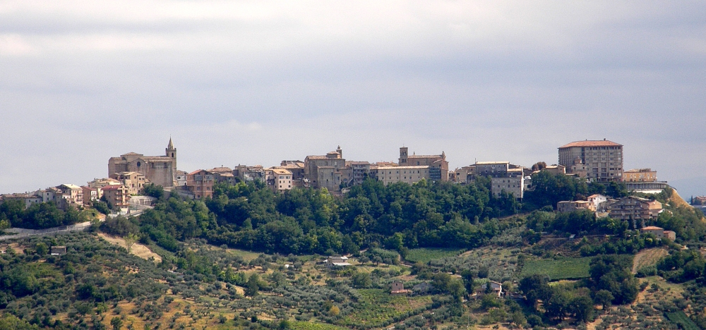 Bucchianico